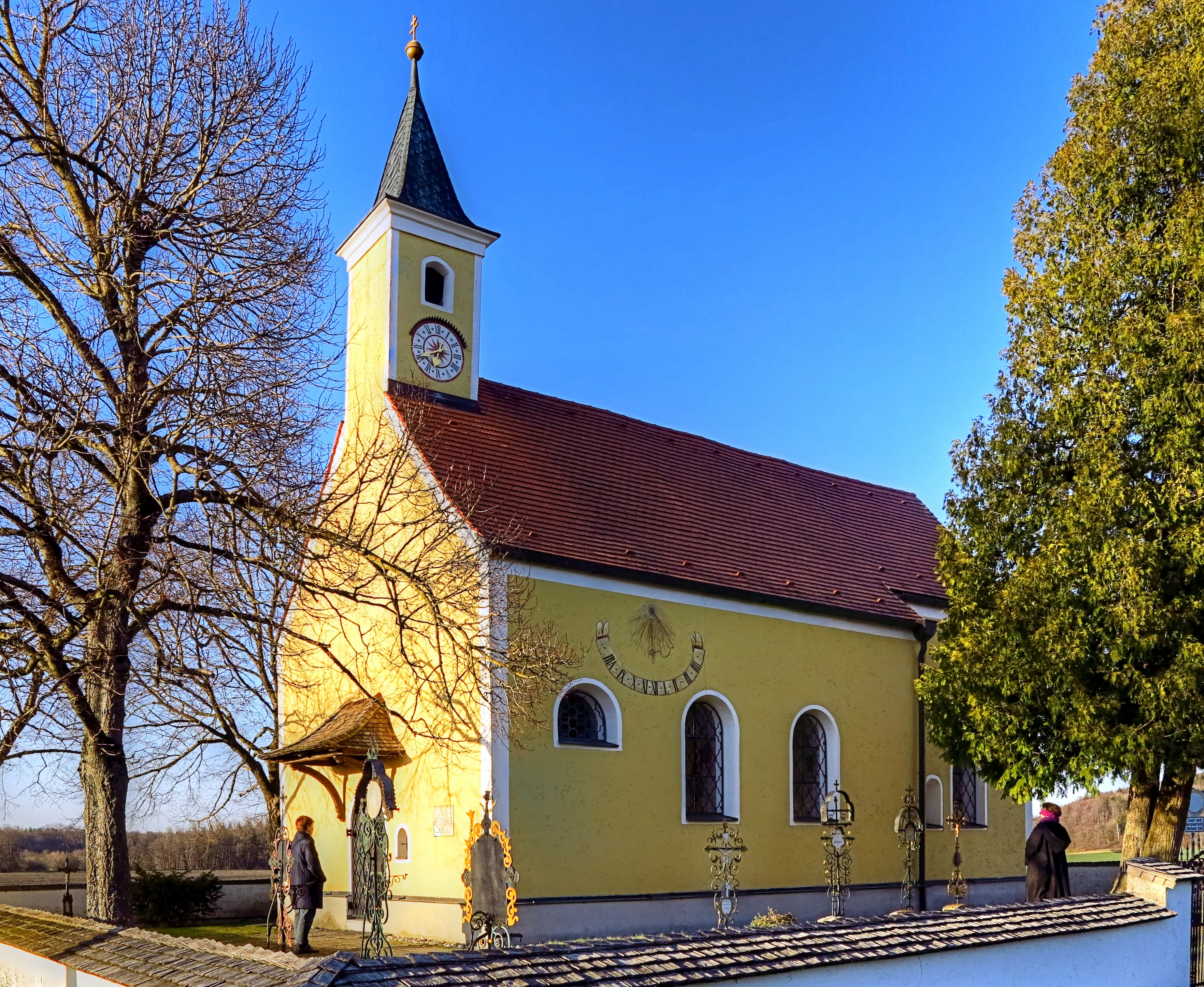 Deutschland, Bayern, Oberbayern, Landkreis Fürstenfeldbruck, Schöngeising, barockisierte, romanische Kirche St. Vitus im Zellweg